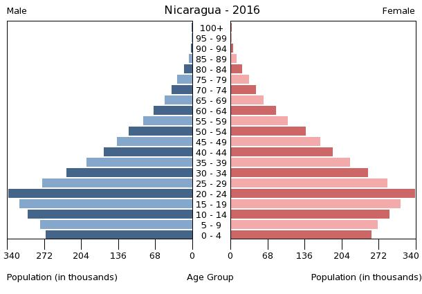 A population pyramid illustrates the age and sex structure of a country's population and may provide insights about political and social stability, as well as economic development. The population is distributed along the horizontal axis, with males shown on the left and females on the right. The male and female populations are broken down into 5-year age groups represented as horizontal bars along the vertical axis, with the youngest age groups at the bottom and the oldest at the top. The shape of the population pyramid gradually evolves over time based on fertility, mortality, and international migration trends.